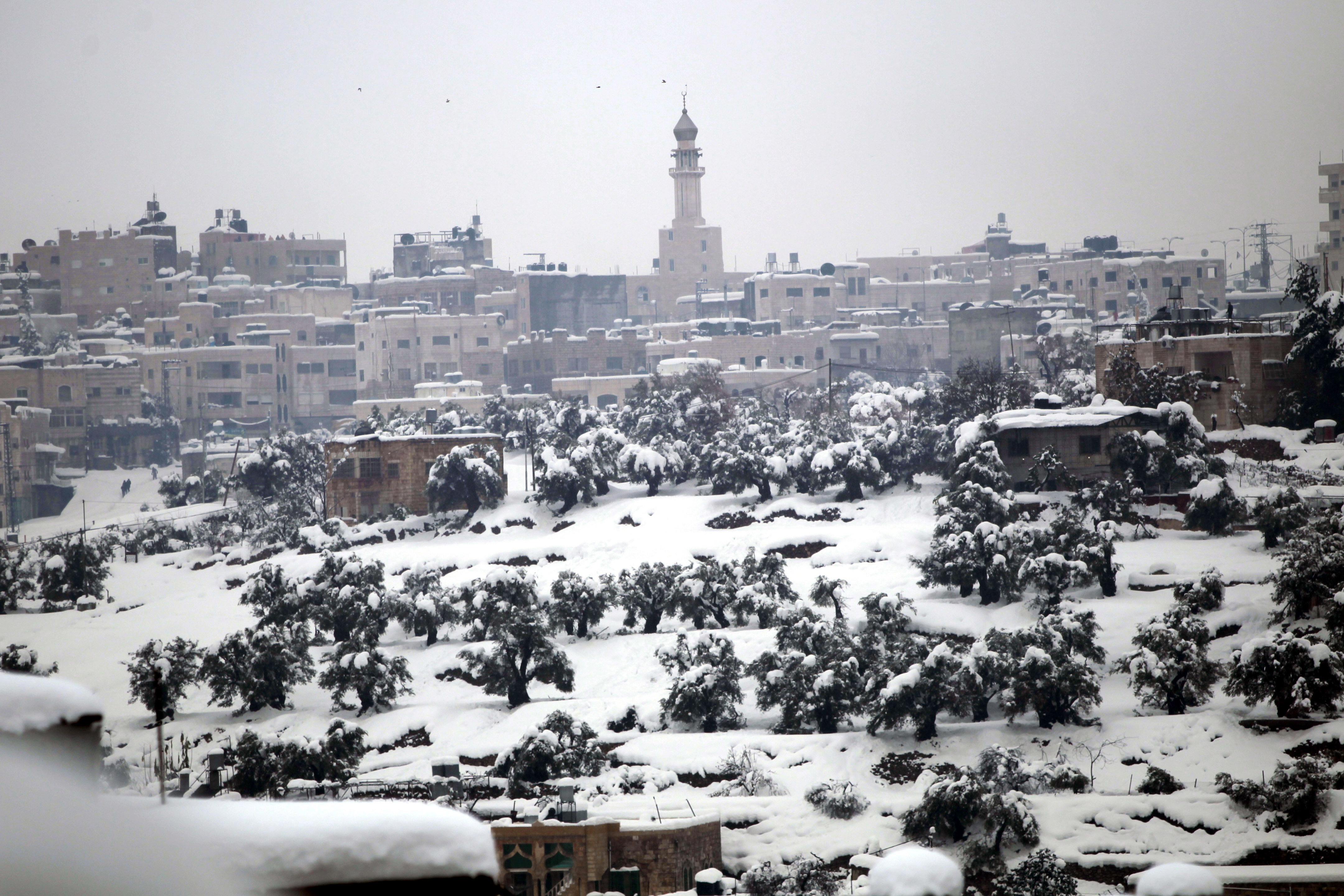 الحرم الابراهيمي في الثلوج